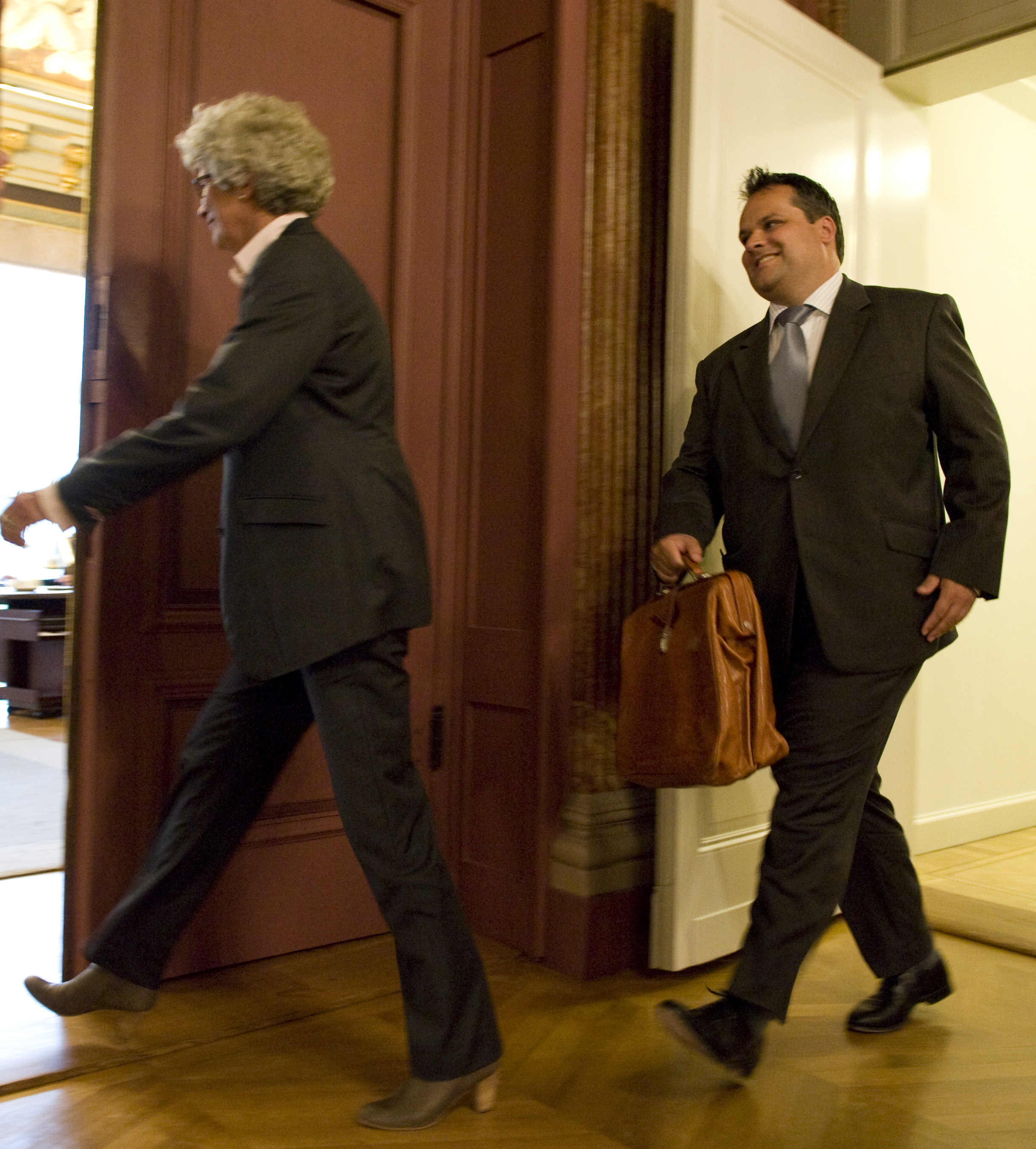 Minister van Financien Jan Kees de Jager